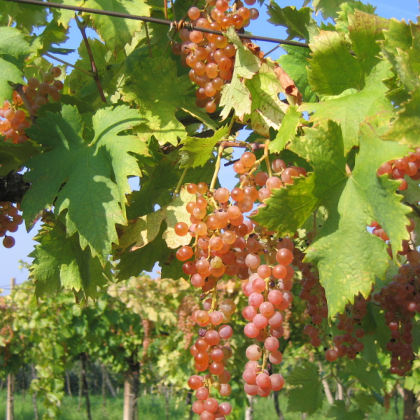 Grappoli di uva Garganega